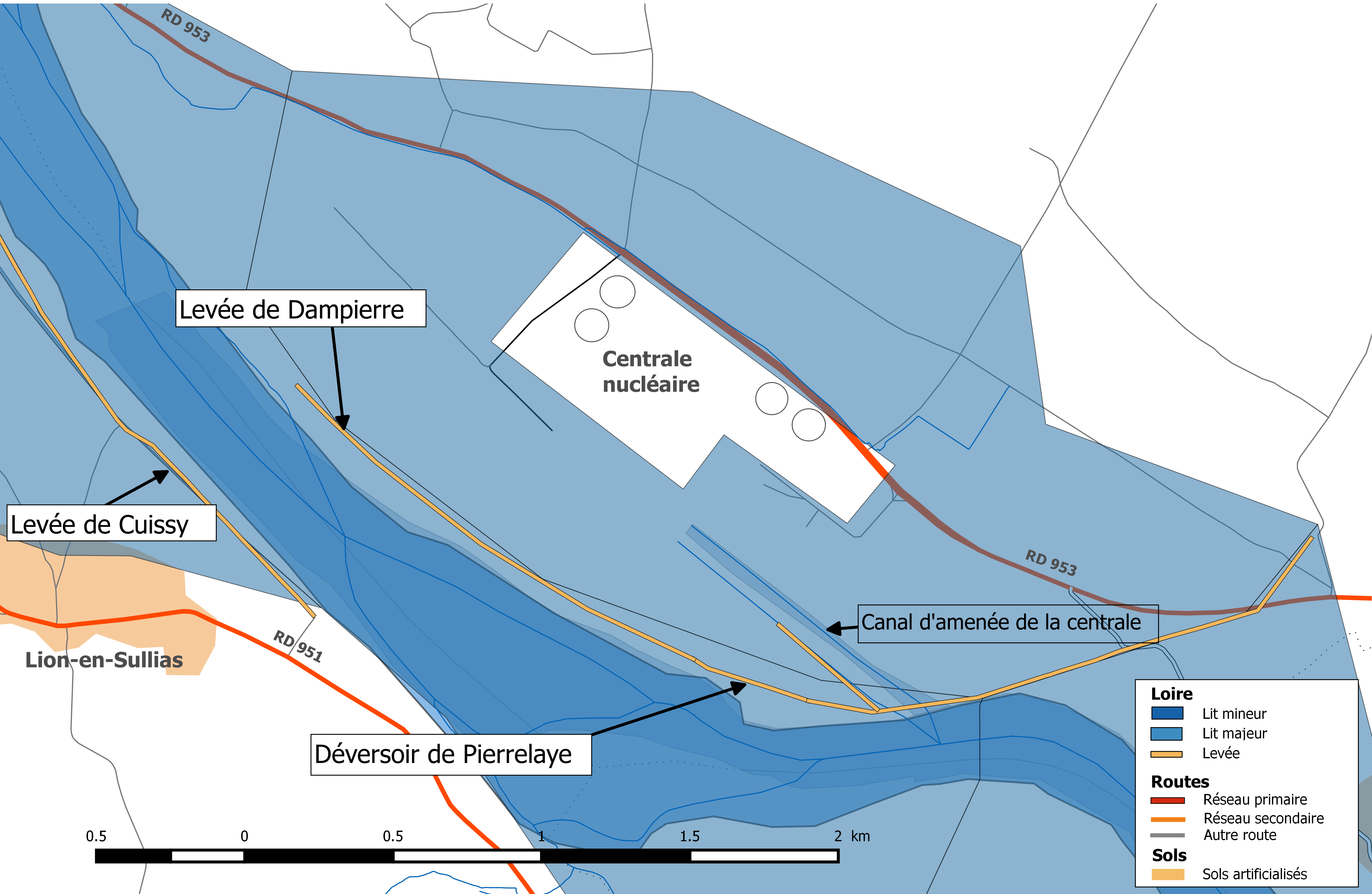 Système d'endiguement de la Loire dans le département du Loiret. Val de Dampierre.